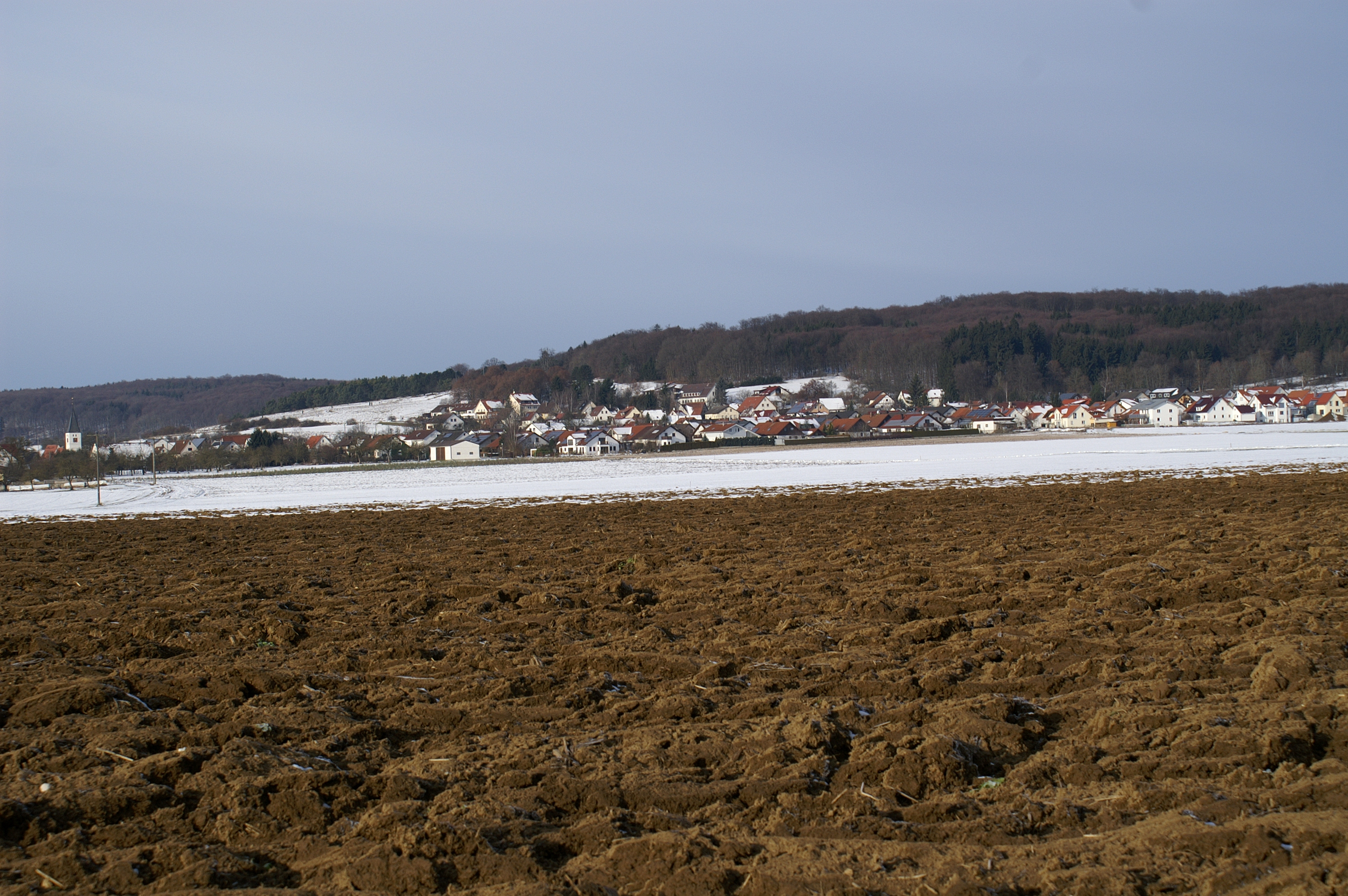 Klifflinie bei Temmenhausen im Alb-Donau-Kreis